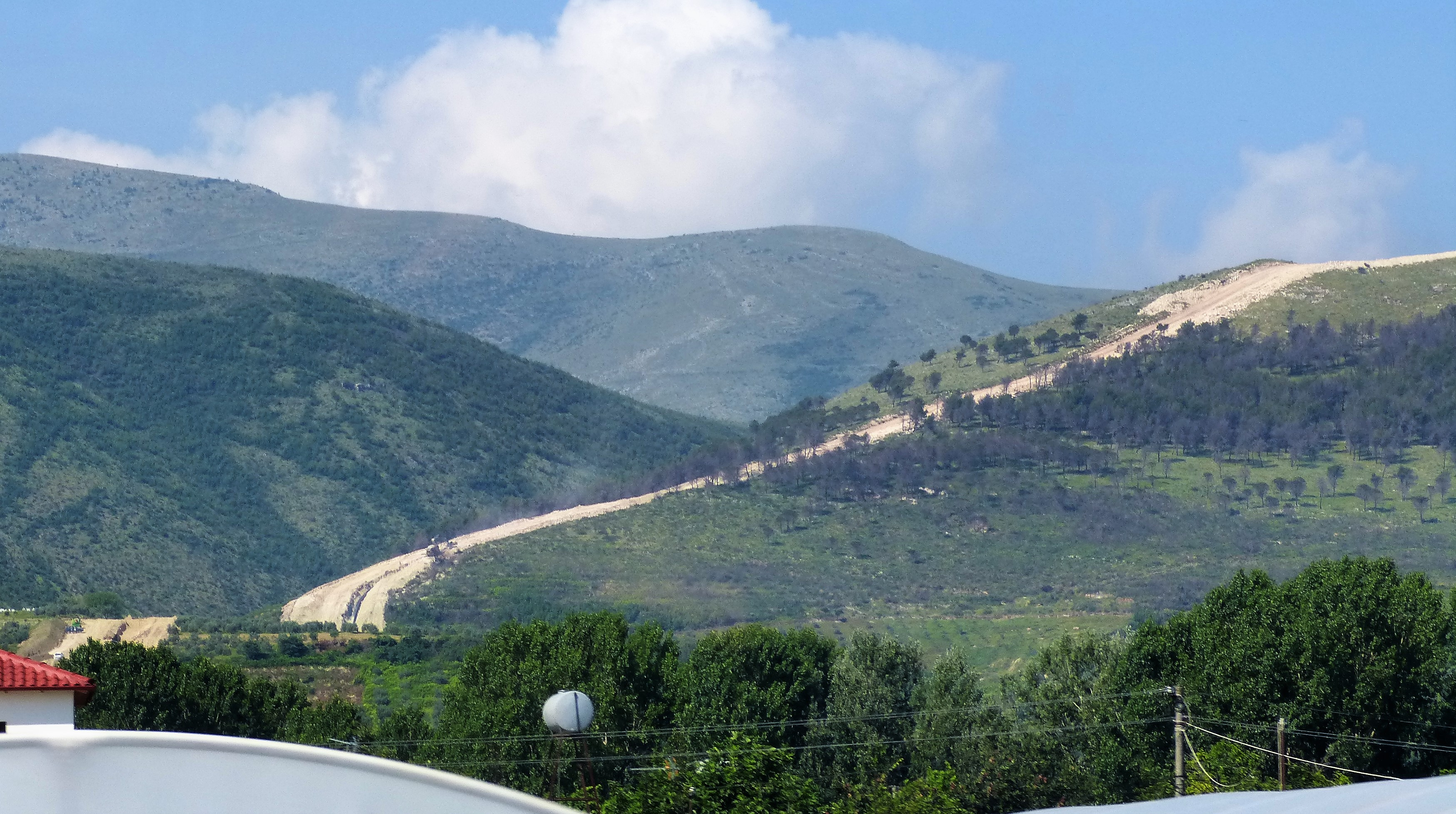 Albania